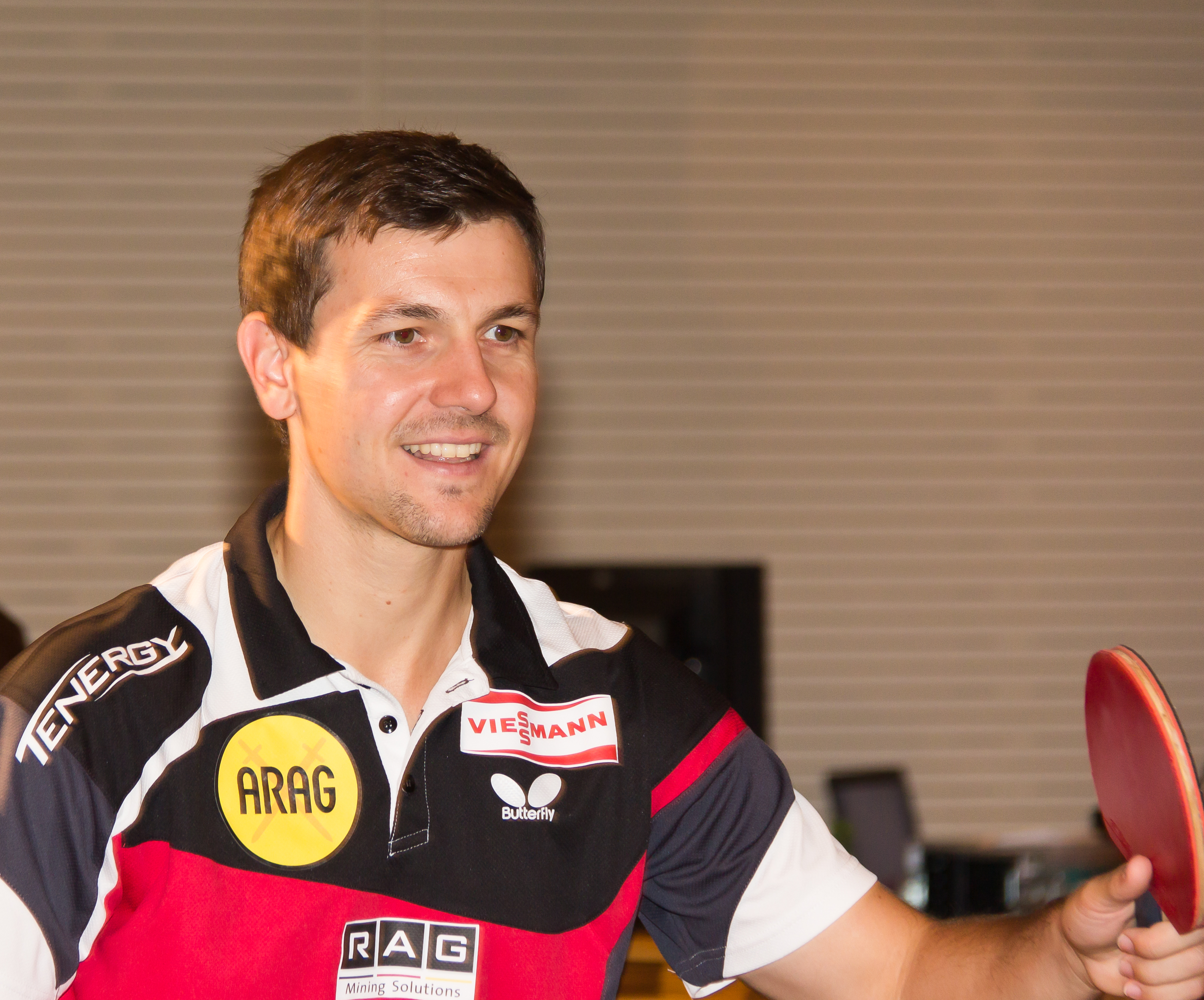 „Business and Investors Forum China 2012“ im Gürzenich, Köln Foto: Profi-Tischtennisspieler Timo Boll im Spiel mit Teilnehmern des Forums